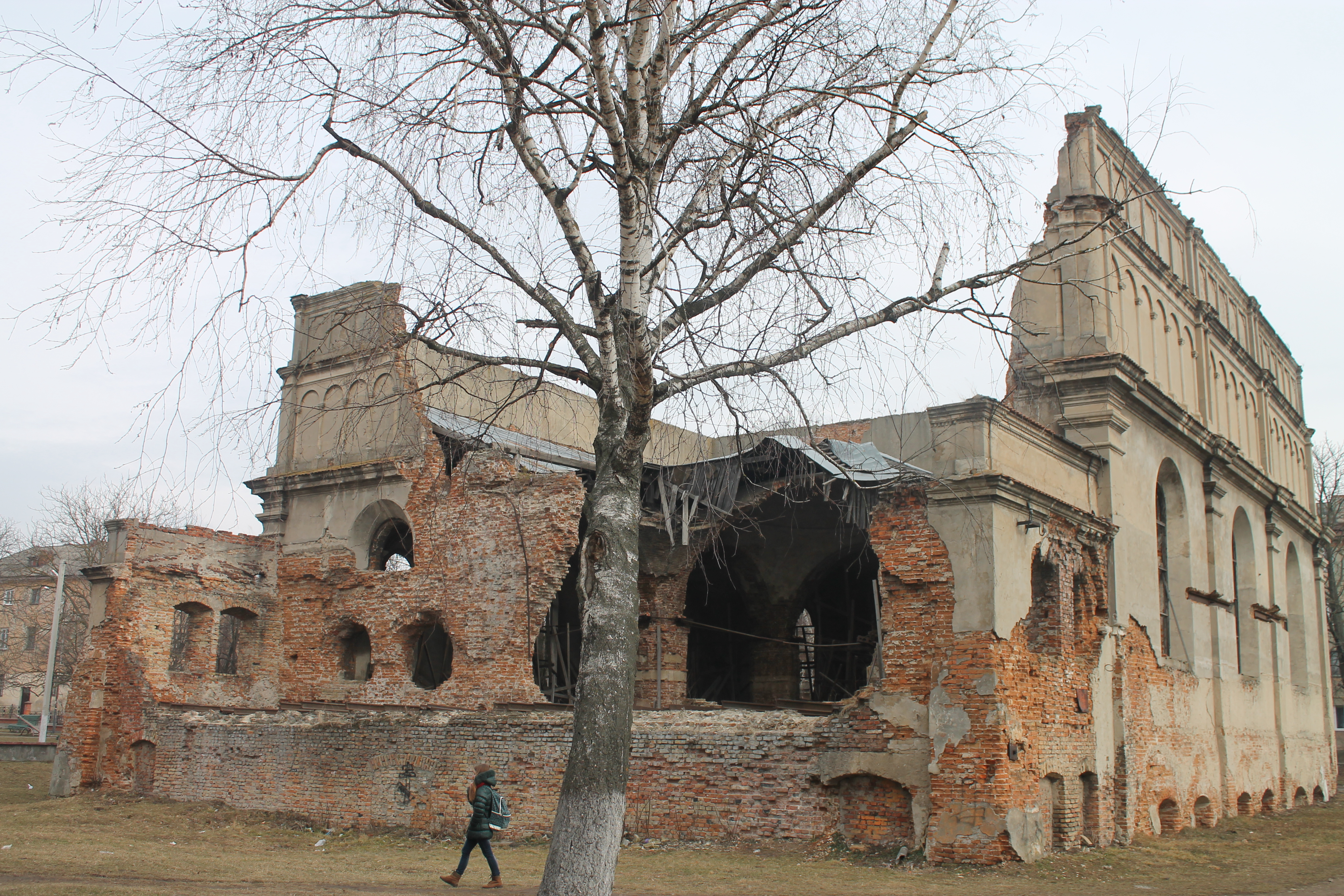 Синагога (мур.), Броди, вул. Гончарська, 12